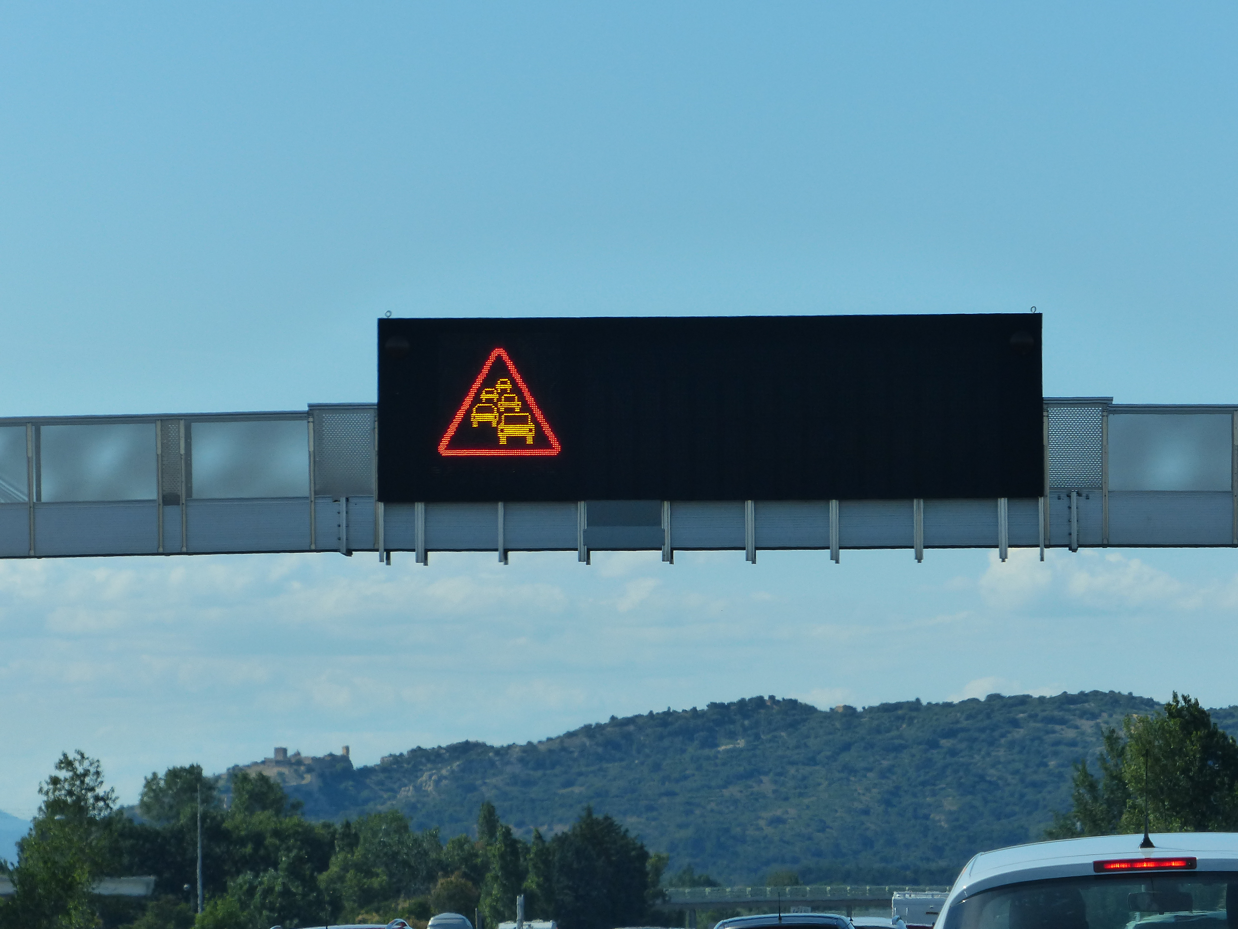 Signal XAK30, autoroute A7, Orange, Vaucluse, France.